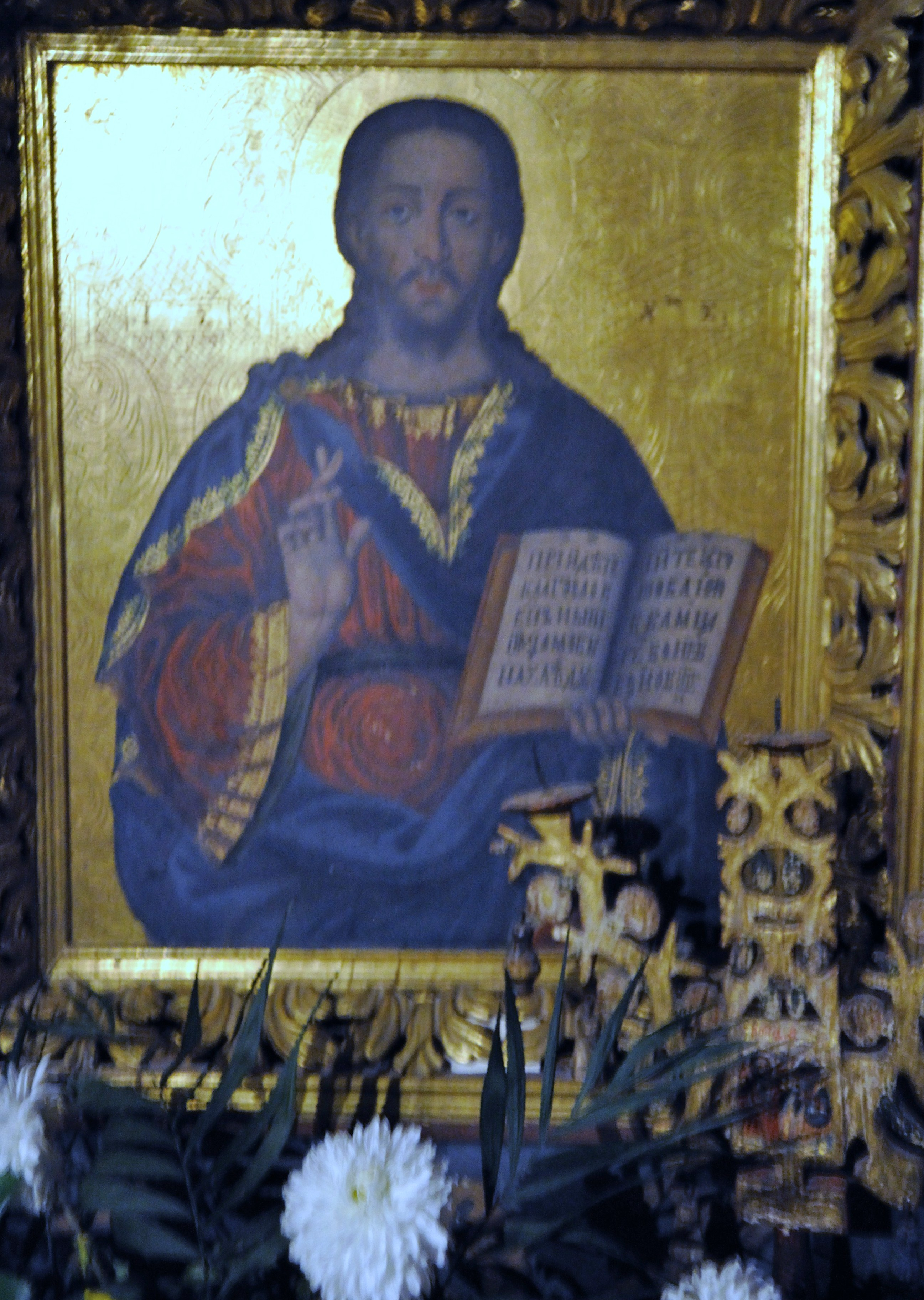 Biserica de lemn „Sfinții Arhangheli Mihail și Gavriil” din Șurdești, județul Maramureș